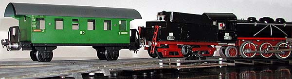 Stadtilm, Museum Modelleisenbahn der ehemals in Deutschland in Stadtilm produzierten Spur 0 (Donnerbüchse und Schlepptenderlok T40)